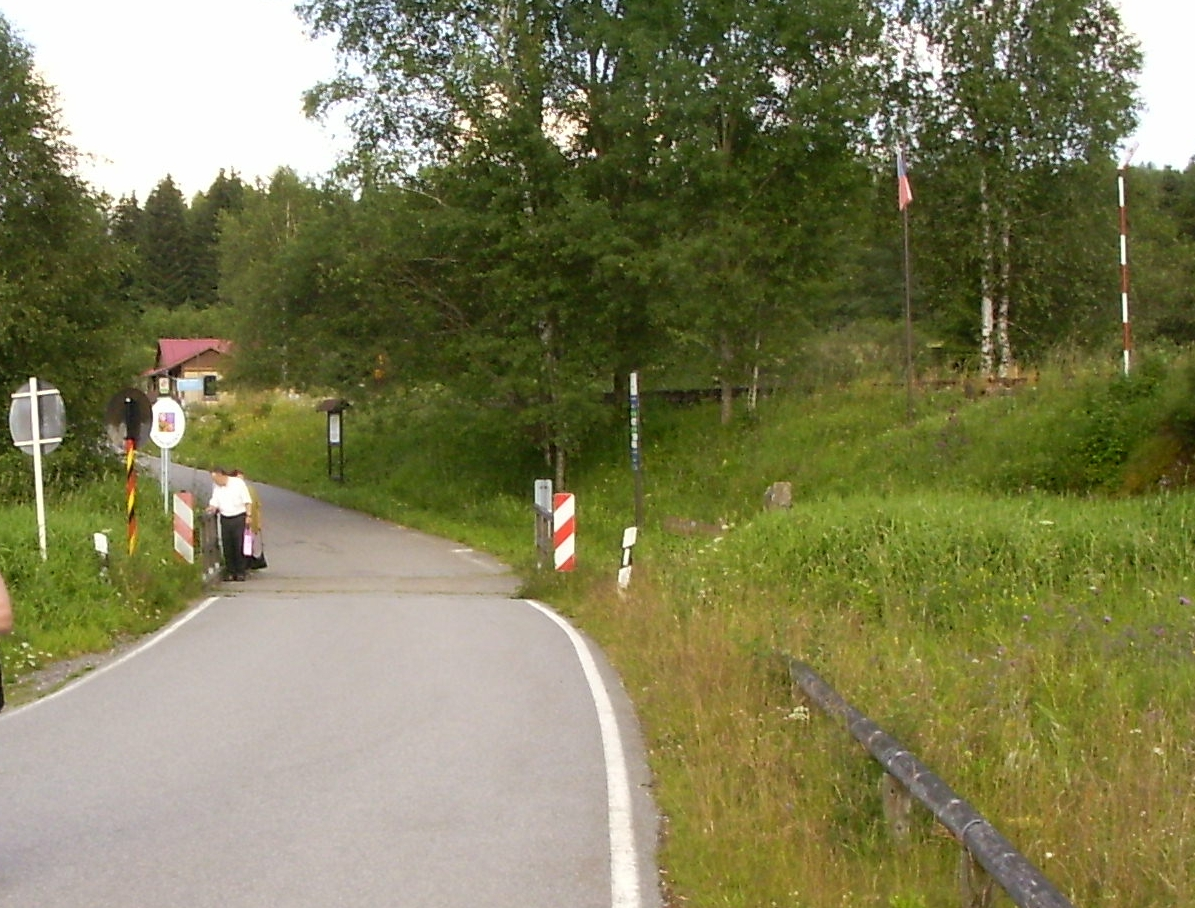 Die Grenze zwischen Haidmuehle (de) und Neuthal (cz)